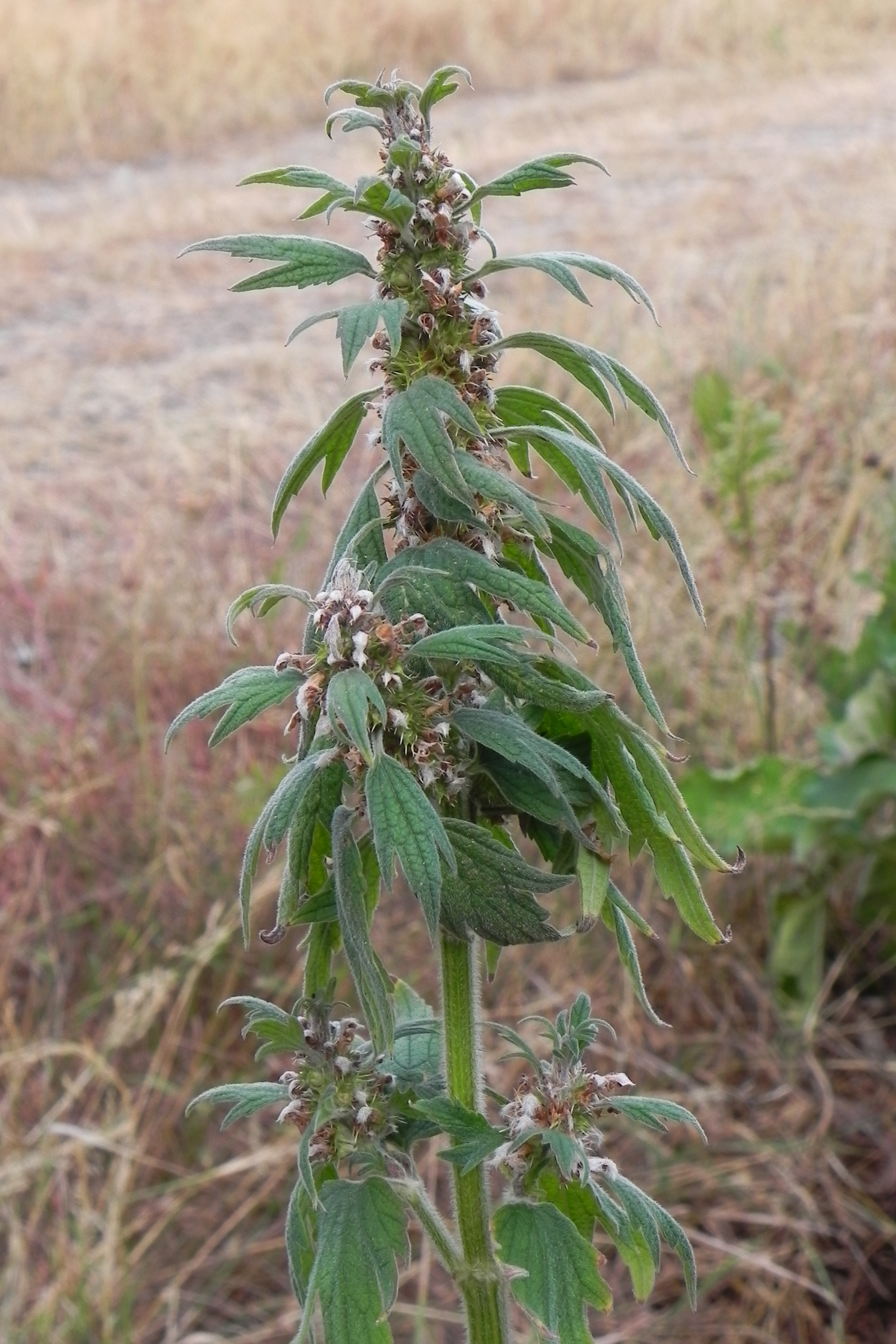 Echtes Herzgespann (Leonurus cardiaca) - Germany Naturpark Südheide